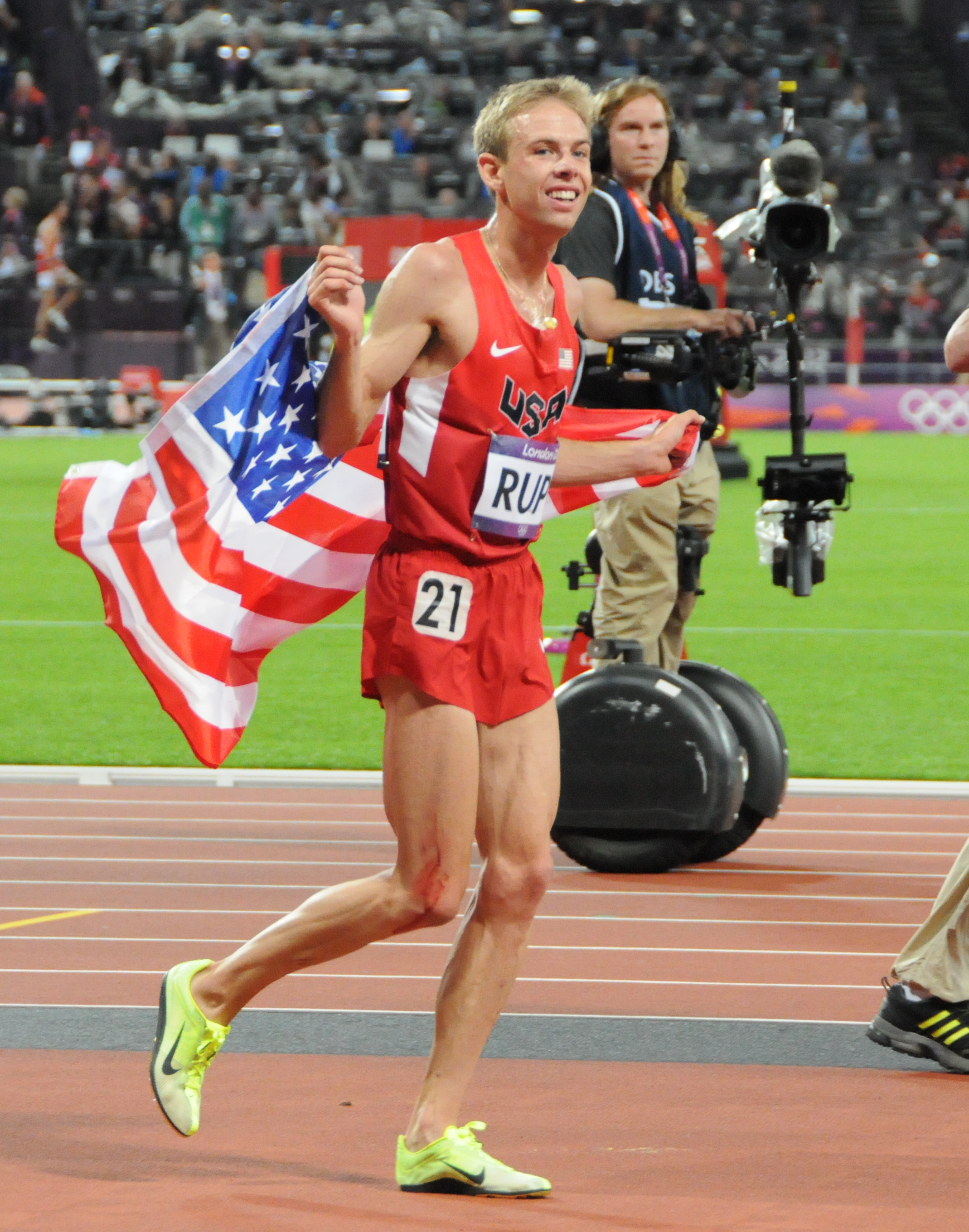 L'athléte RUPP Galen célébrant sa médaille d'rgent dans la course du 10000 m au stade olympique de Londres